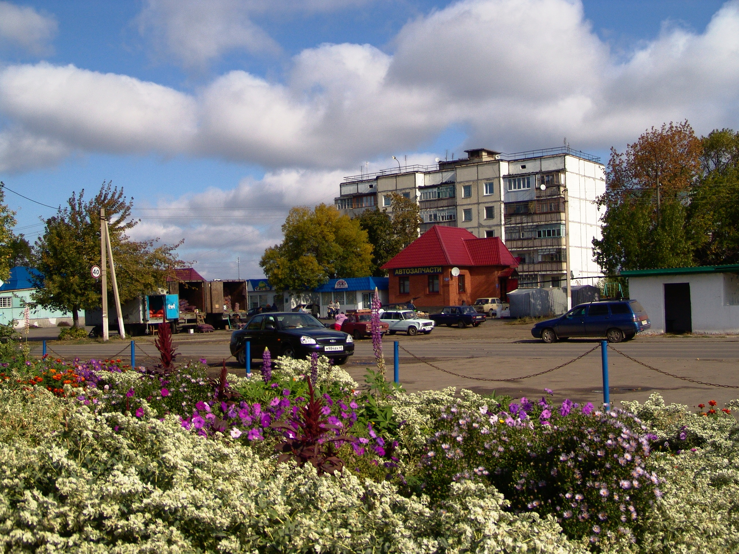 Жердевка, город Тамбовской области, площадь на въезде со стороны села Сукмановка. Цветник магазина «Домовёнок»